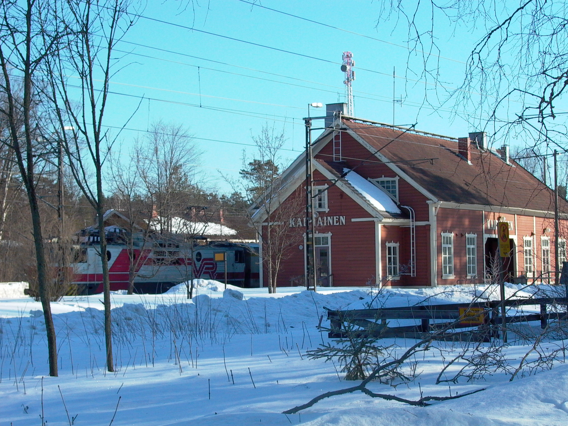 Kaipiaisten rautatieasema